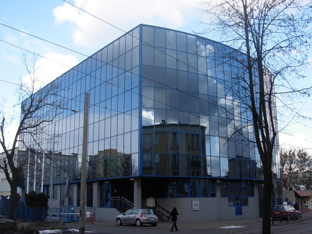 Ulica Chodkiewicza w Bydgoszczy